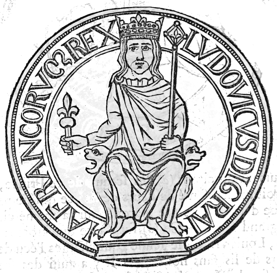 issu du "Nouveau traité de diplomatique...".